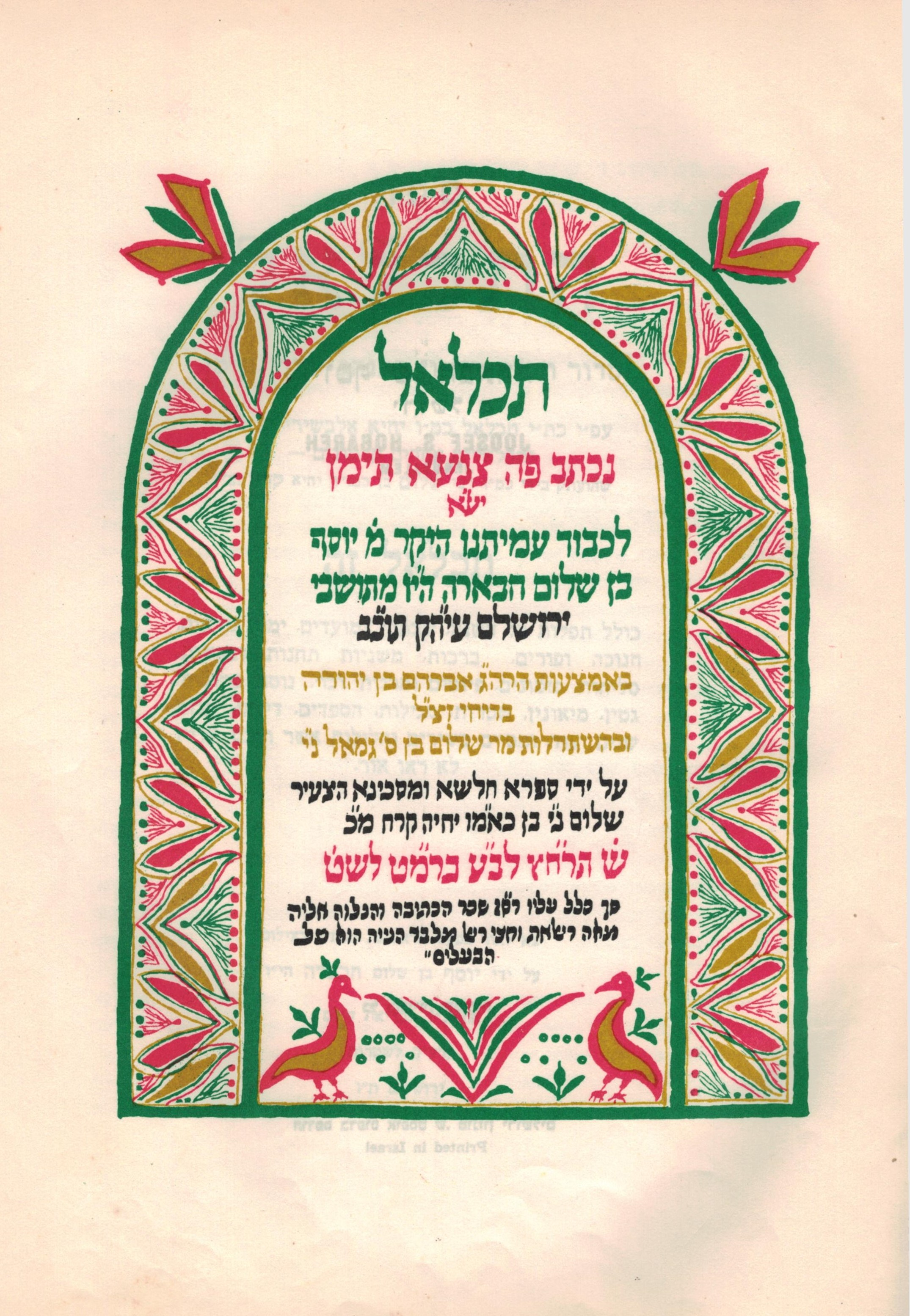 עמוד השער, תכלאל קדמונים